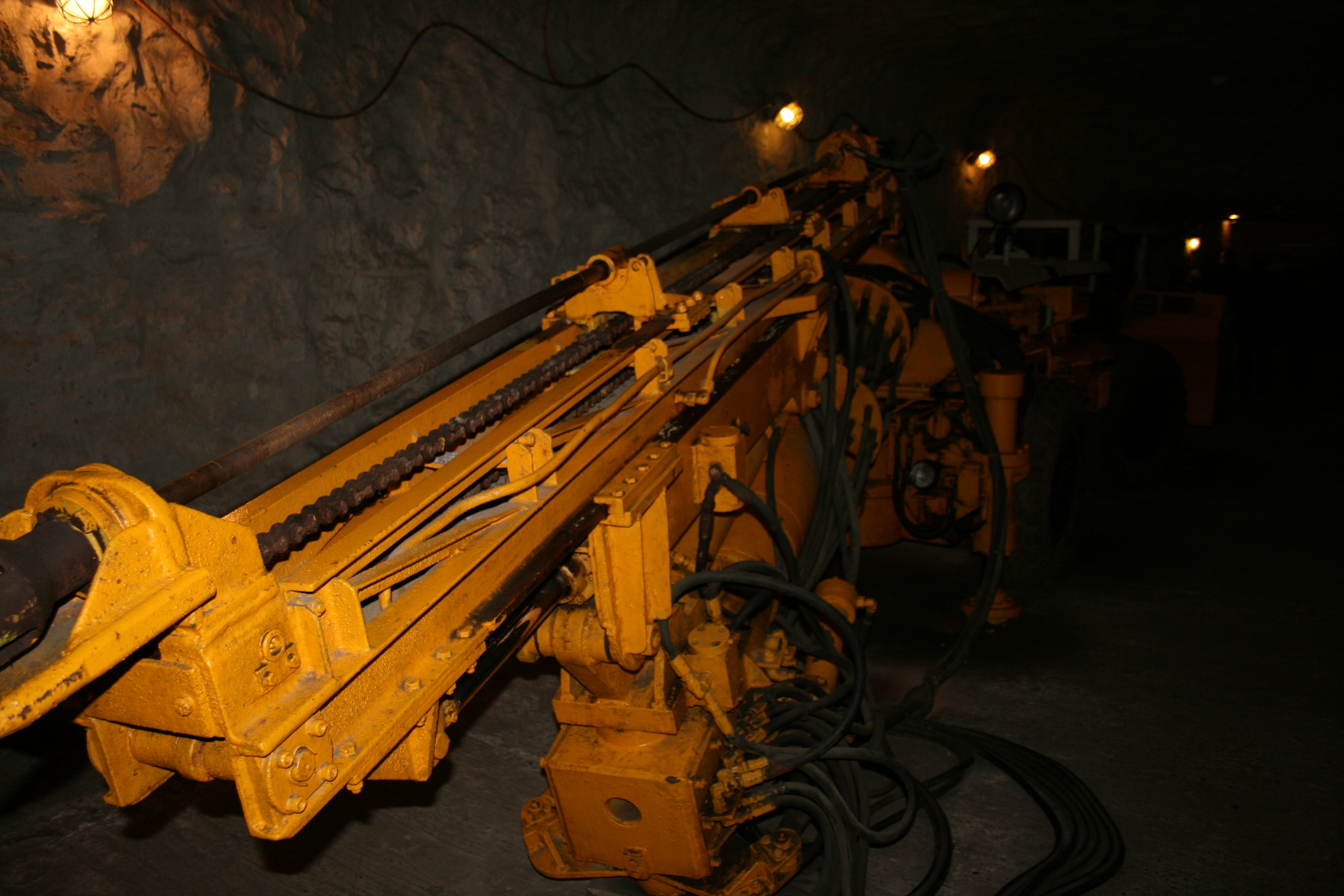 Elektrohydraulischer Bohrwagen von der Grube Bülten-Adenstedt. Niedersachsen, Deutschland.